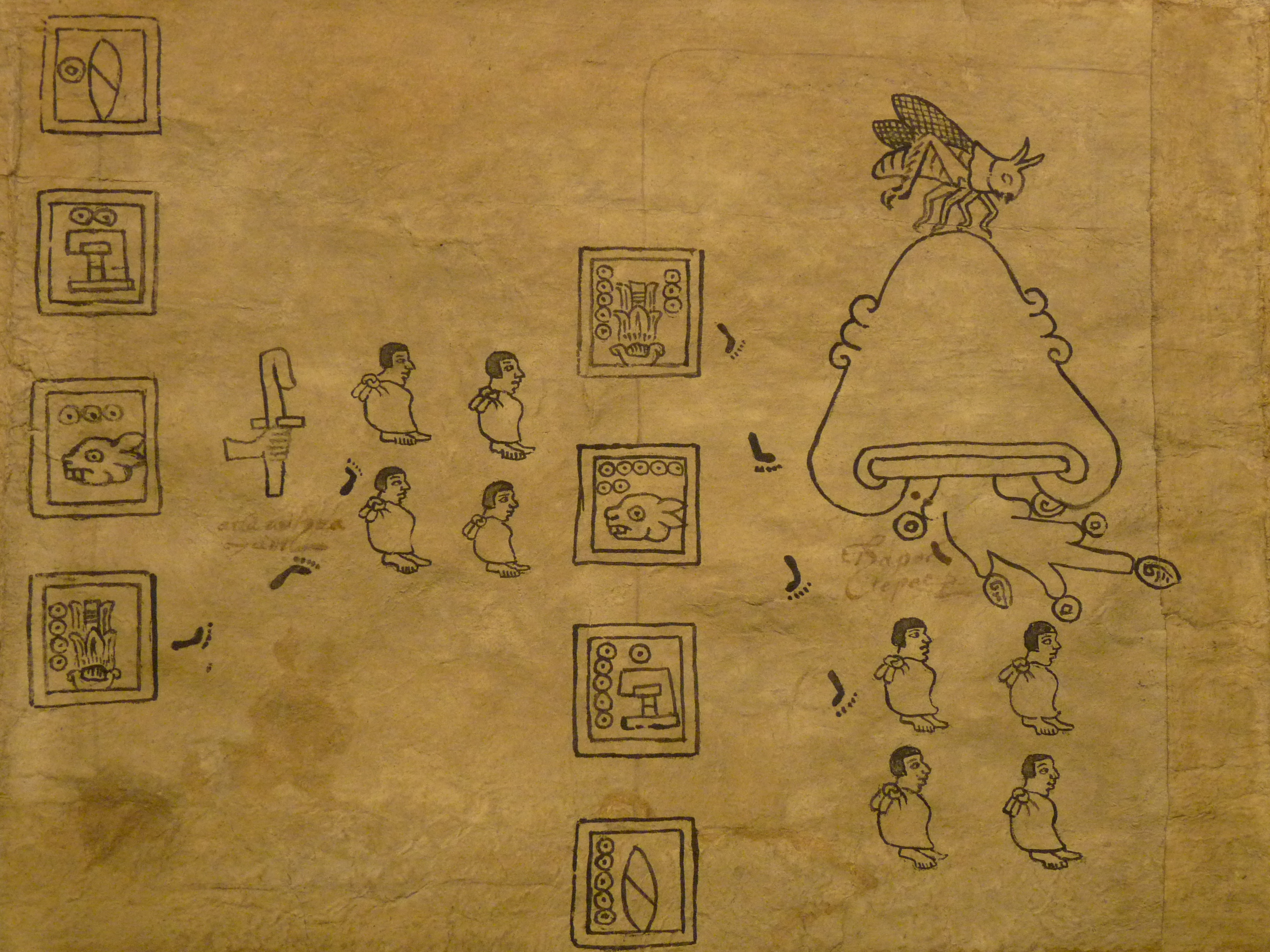 Codex Boturini (also known as Tira de la peregrinación), folio 18